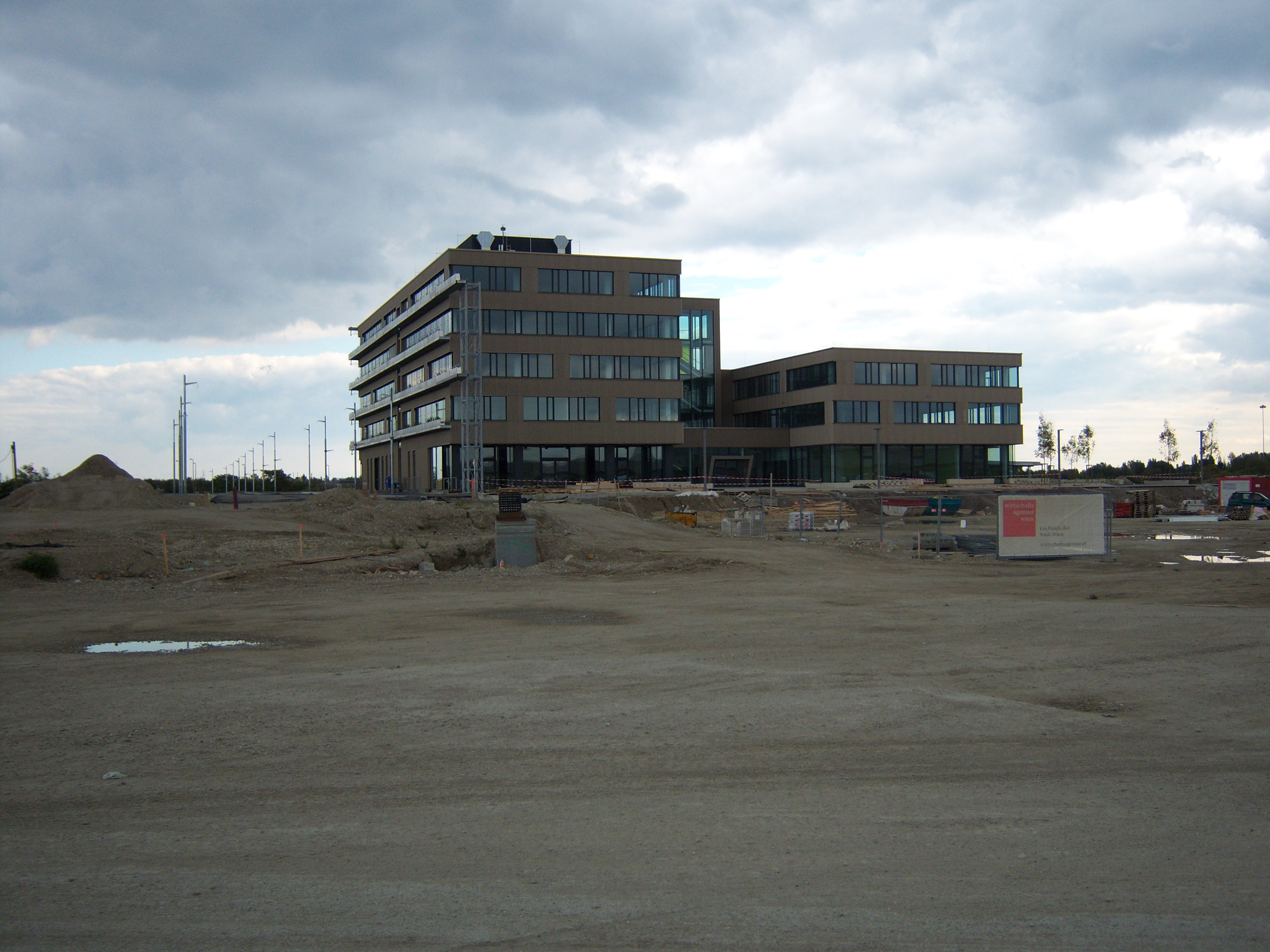 Das erste Haus in der Seestadt Aspern